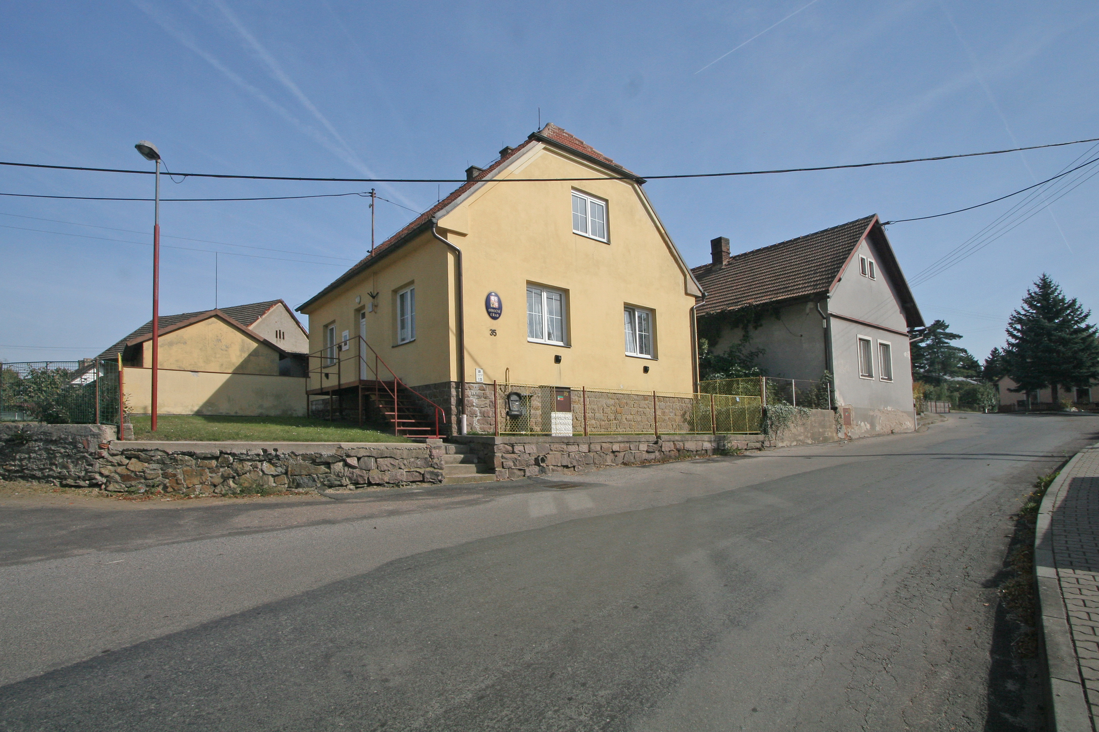 Sovolusky obecní úřad